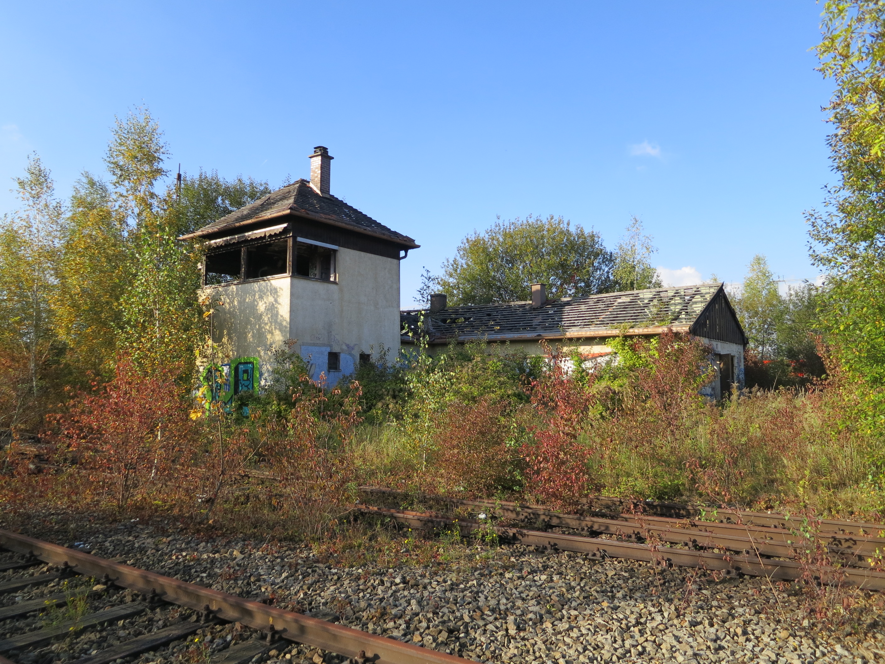 ehemalige Rangierobermeisterei Ost neben den Richtungsgleisen des Rangierbahnhofs München Ost